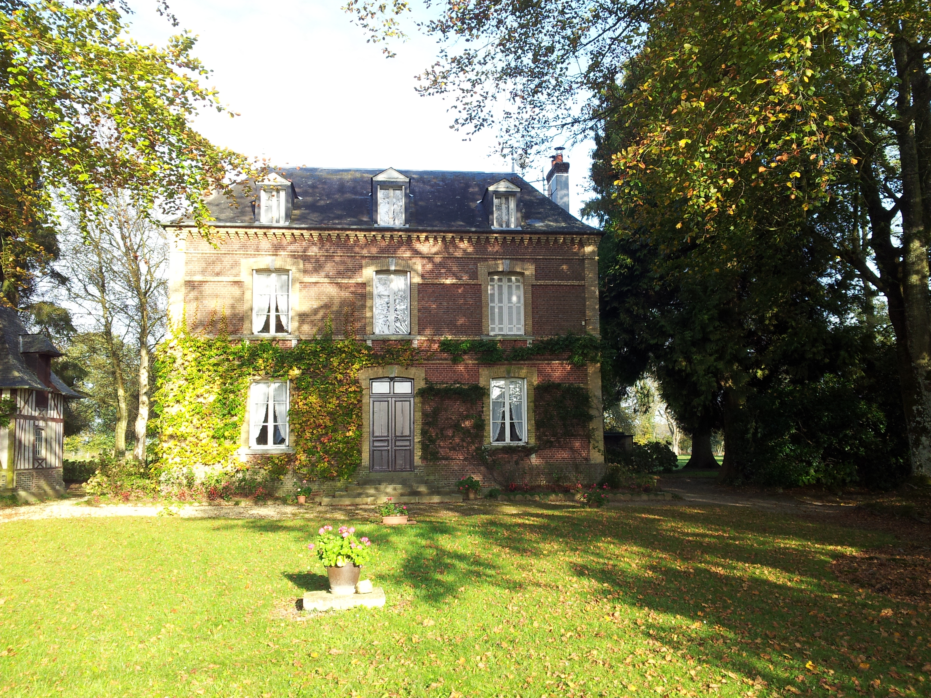 Maison de maitre construite en Normandie à la fin du 19ème siècle